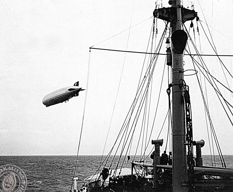 Graf Zeppelin saludando al buque argentino General San Martín en Pernambuco, Brasil, 1930. Documento Fotográfico. Inventario 22577